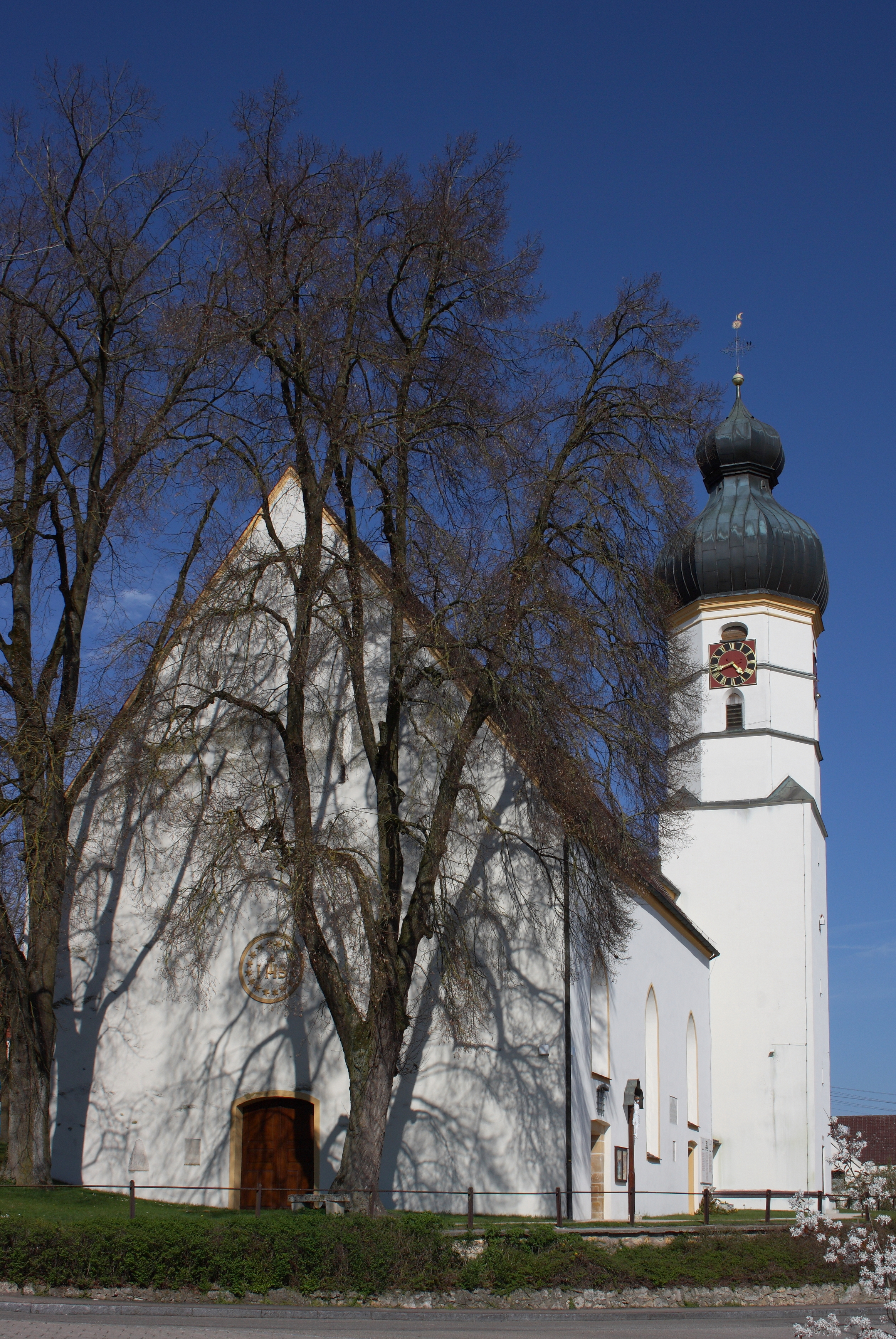 Katholische Pfarrkirche Mariä Himmelfahrt in Hochaltingen, einem Ortsteil von Fremdingen im Landkreis Donau-Ries (Bayern), Unterbau des Turmes von 1520, oktogonaler Aufbau mit Doppelzwiebel um 1730